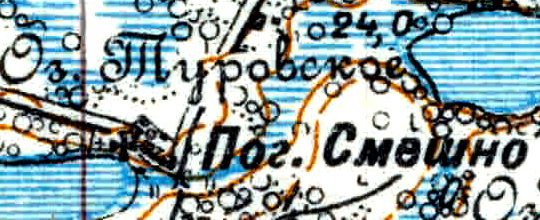 Топографическая карта Ленинградской области, квадрат Vc-29 (Батецкая), деревня Смёшино